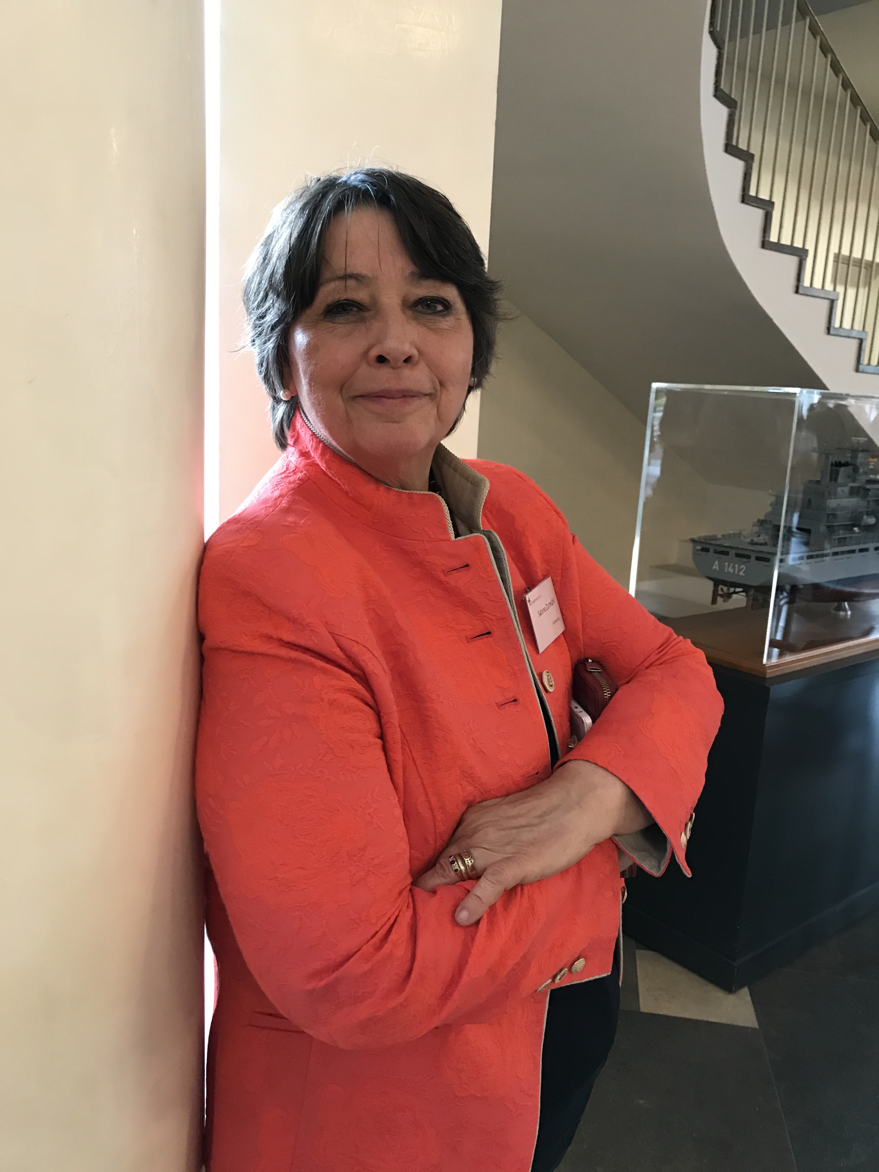 Zurmühl steht an Säule